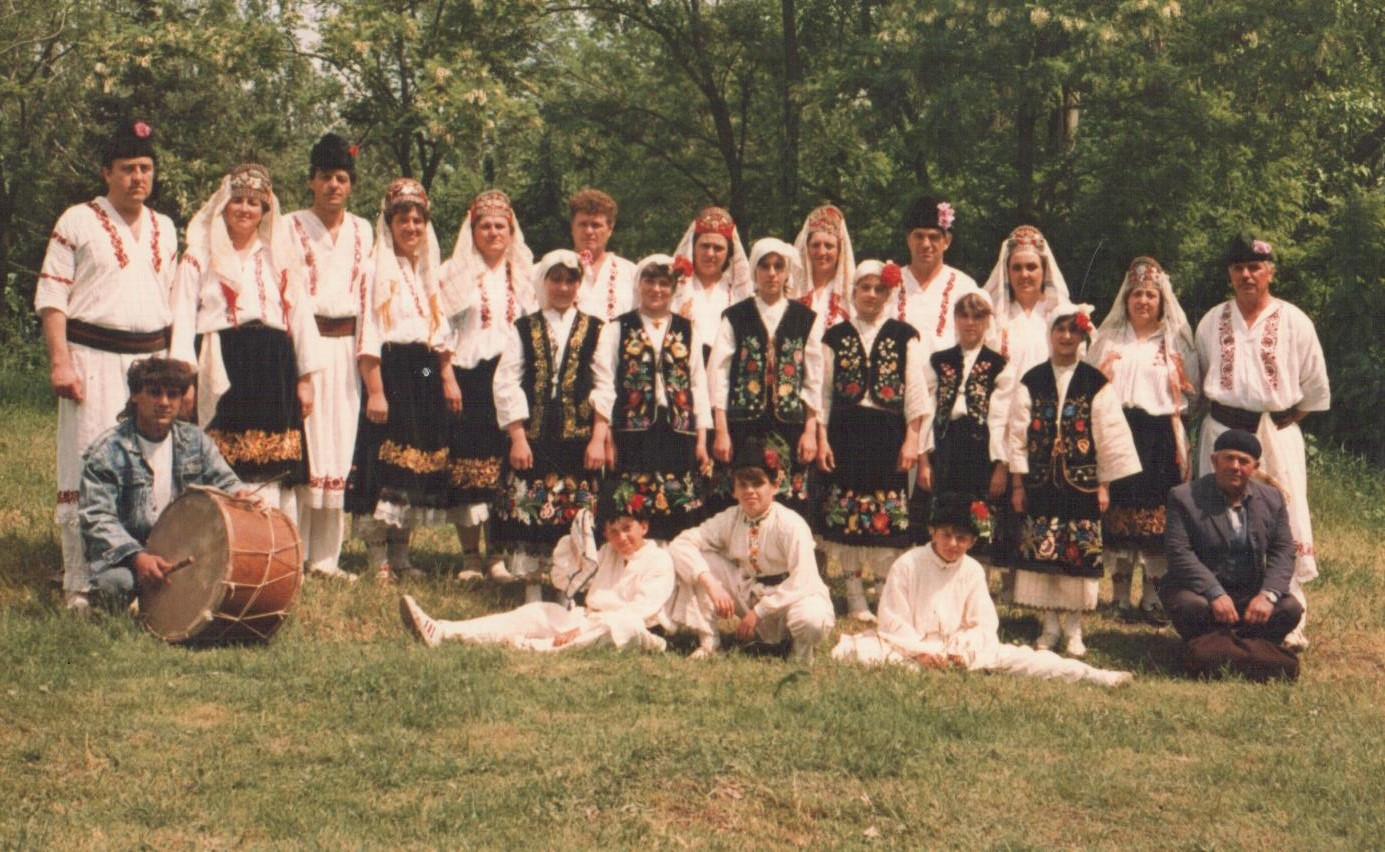 Фолклорни танцови състави към Читалището